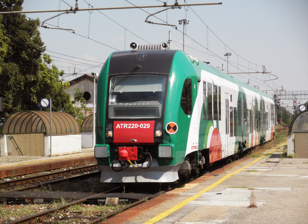 Autotreno ATR 220 delle Ferrovie Emilia Romagna in stazione di Piadena